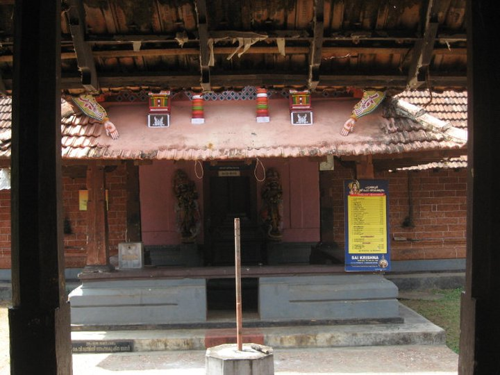 പുത്തൂർ ശിവക്ഷേത്രം-നാലമ്പലം